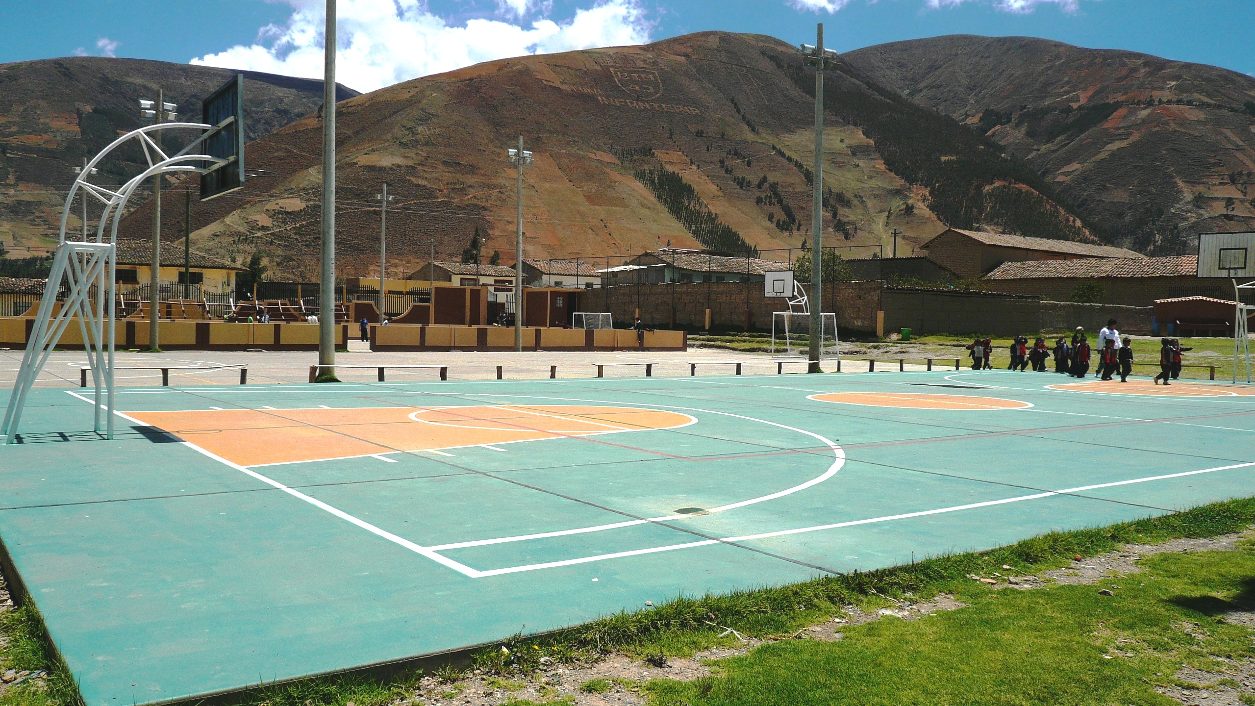 Campo deportivo Mosqueta en la ciudad de Pampas.